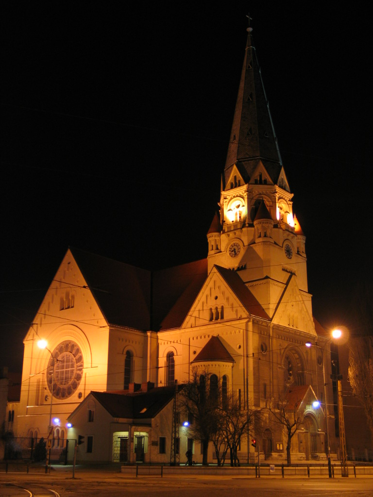 Kościół św. Mateusza w Łodzi